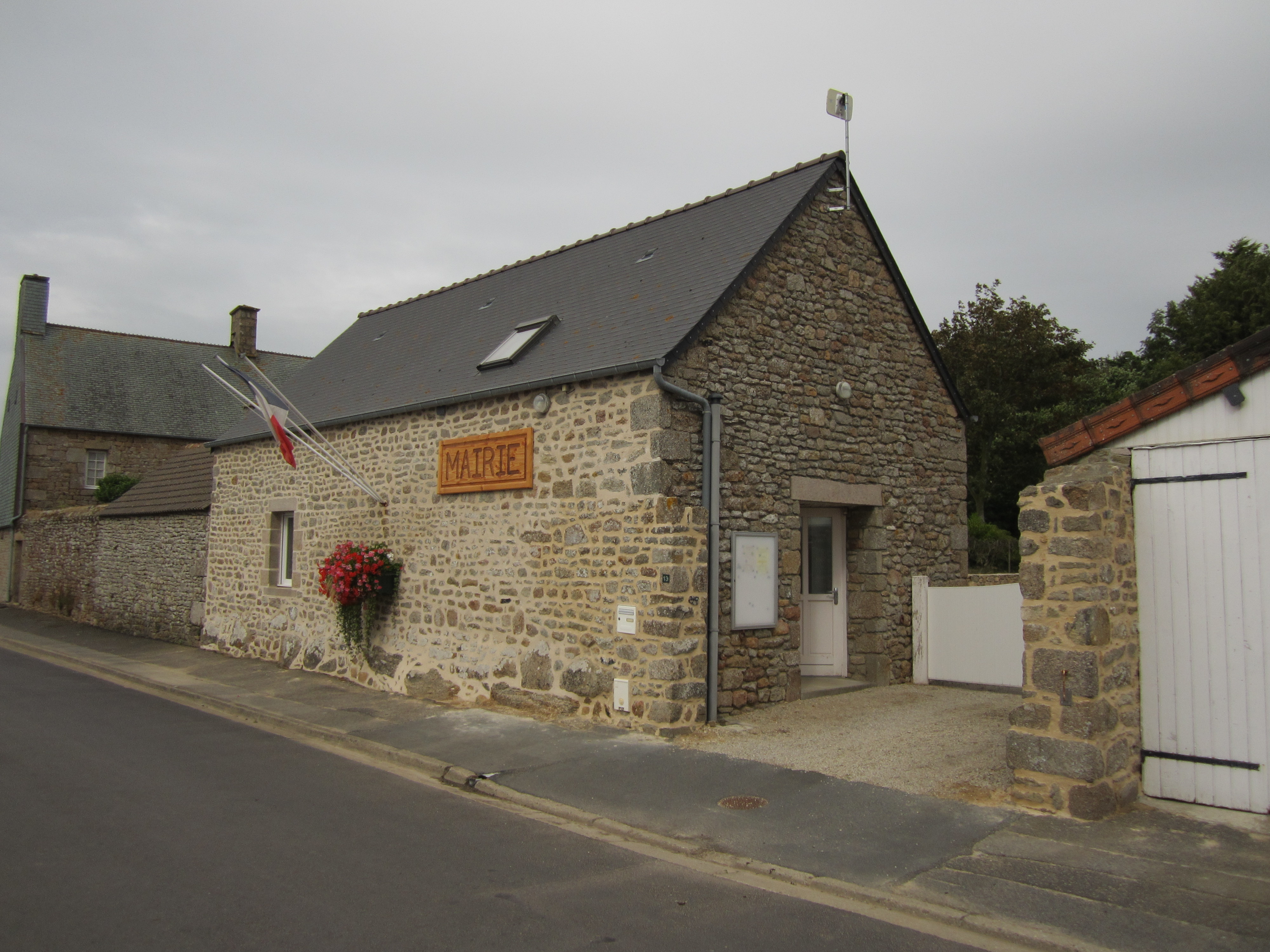 Église Saint-Martin de Réthoville, Manche